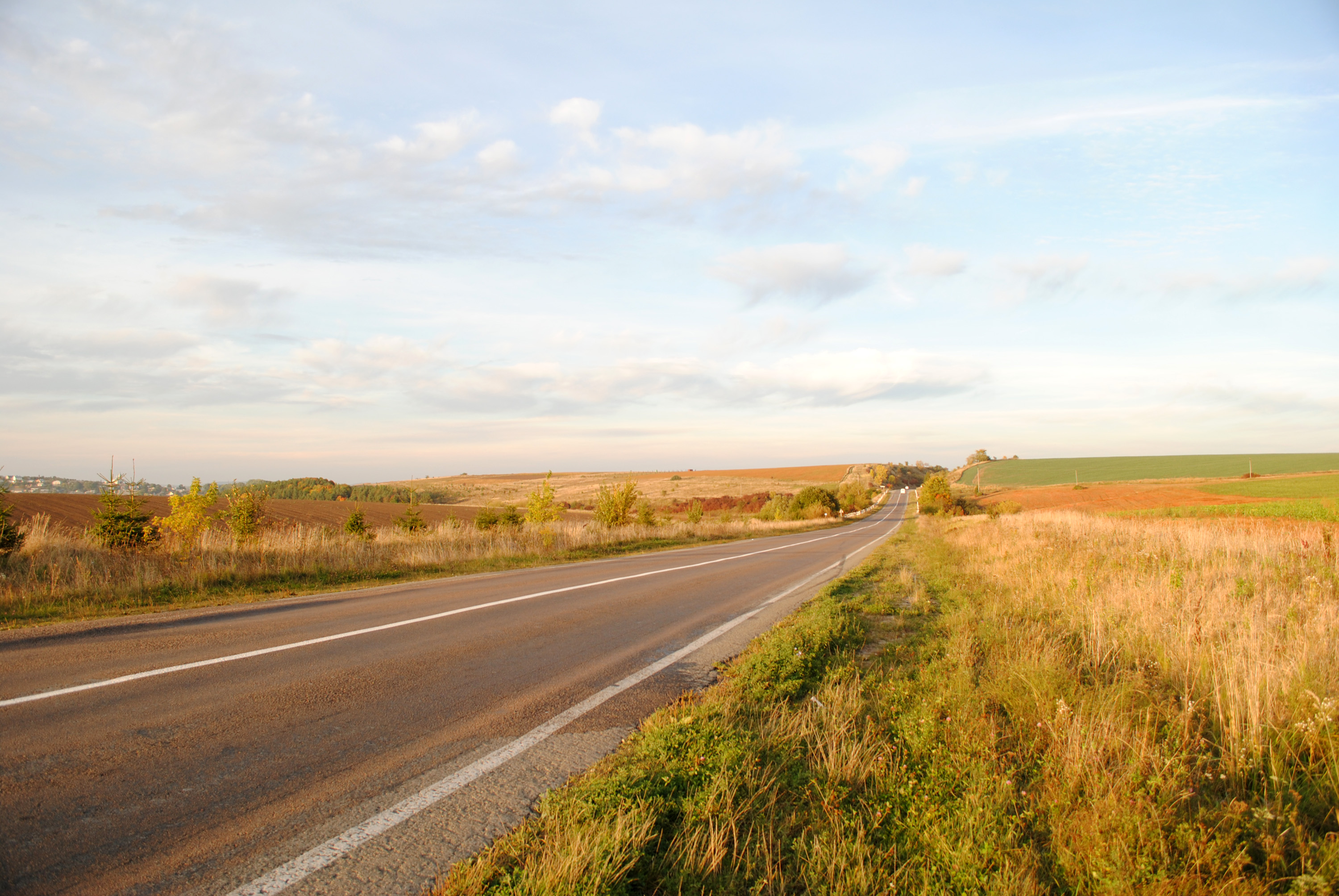 Автошлях Р 41 на відтинку біля с. Великий Глибочок Тернопільського району Тернопільської області.